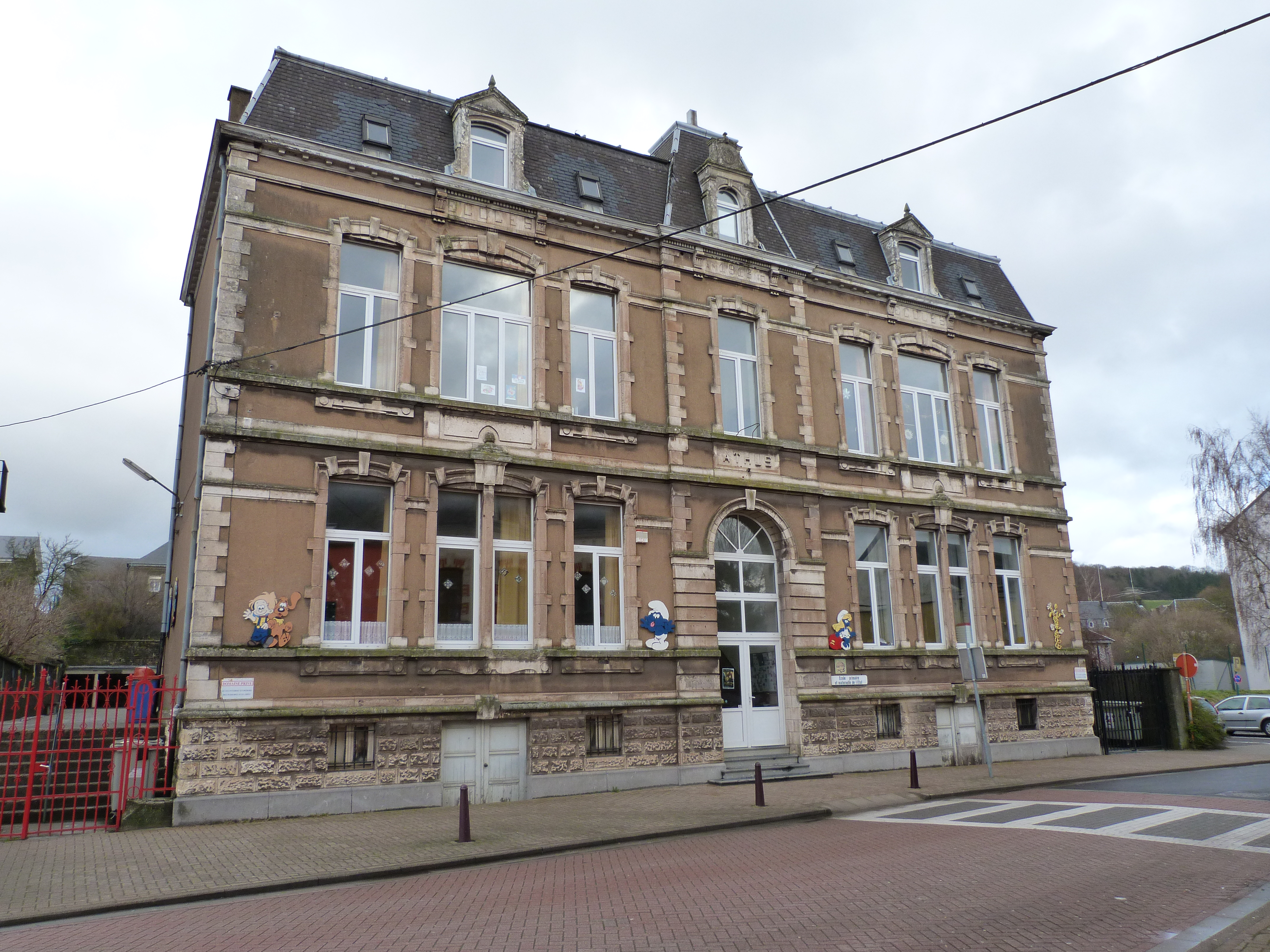 L'école maternelle du centre à Athus. Ce fut le premier Hotel de Ville de la commune d'Athus